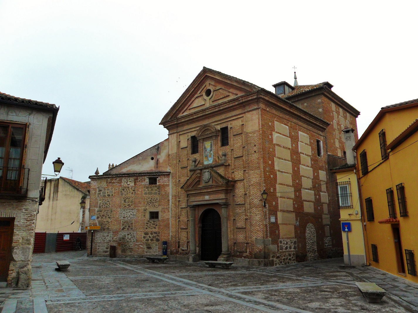 Convento de las Bernardas en Talavera de la Reina (Castilla-La Mancha, España).